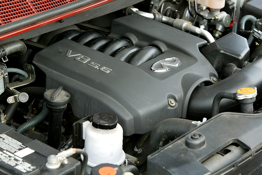 Nissan VK56DE Engine